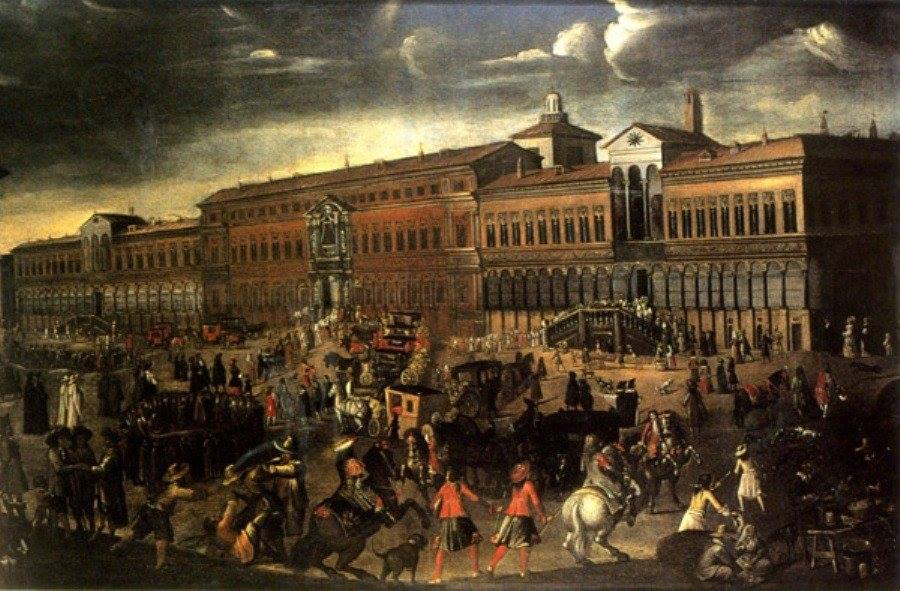 L'Ospedale Maggiore di Milano nel giorno della Festa del Perdono (fine del XVII secolo)